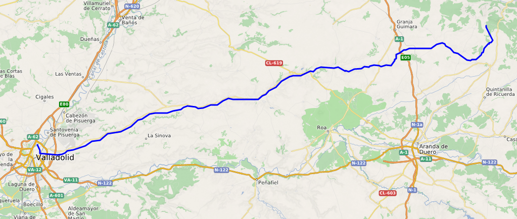 carte réalisée sur umap This map may be incomplete, and may contain errors. Don't rely solely on it for navigation.